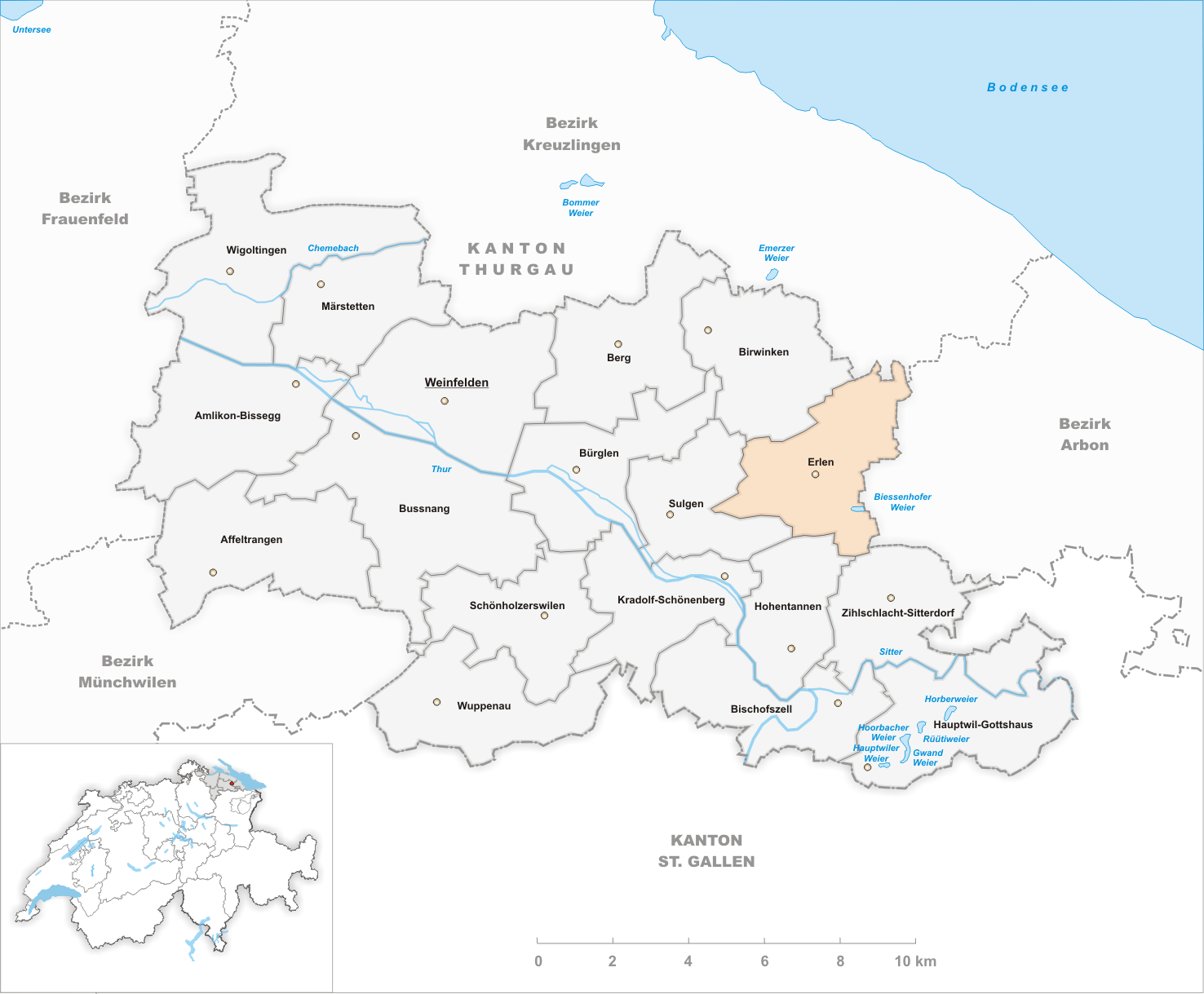 Municipality Erlen